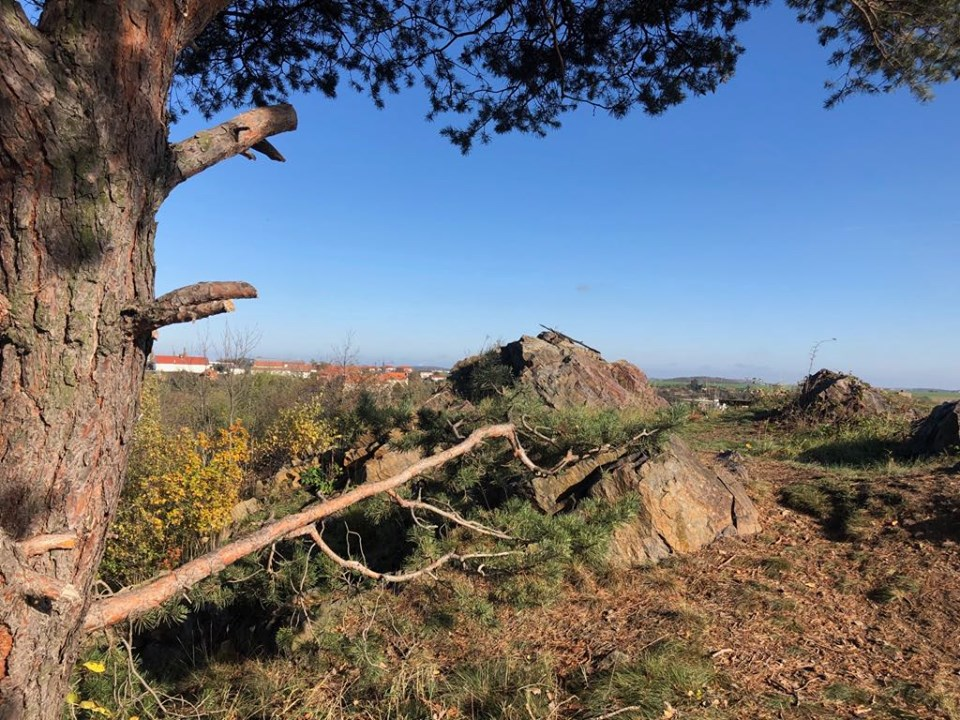 Pohled na Tuchoměřice z lomu Kneživka